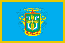 Прапор Кам'янського району Черкаської області України